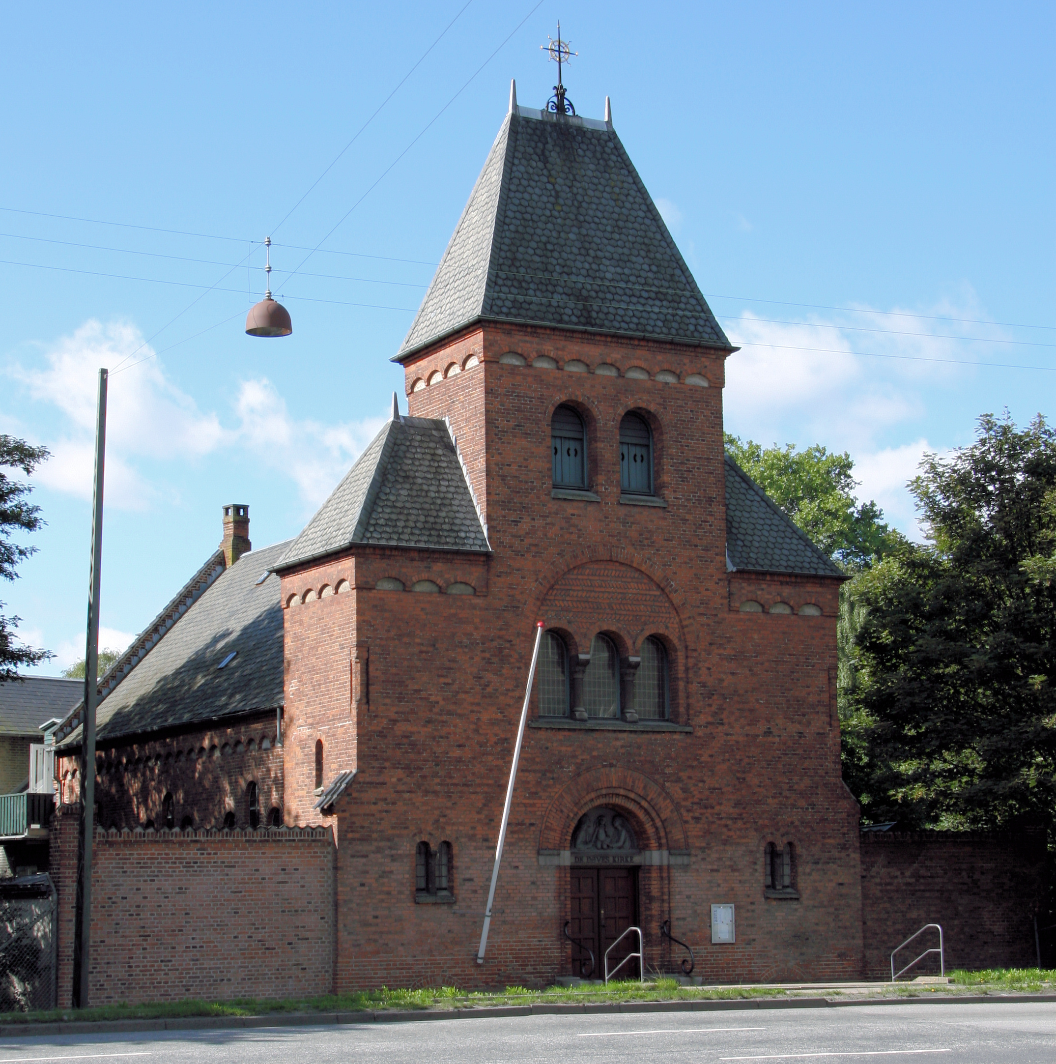 De Døves Kirke in Copenhagen, Denmark.